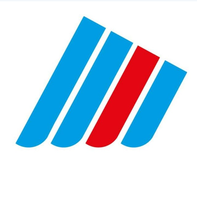 Logo Der rechtsextremistischen Vereinigung Der Flügel innerhalb der AfD